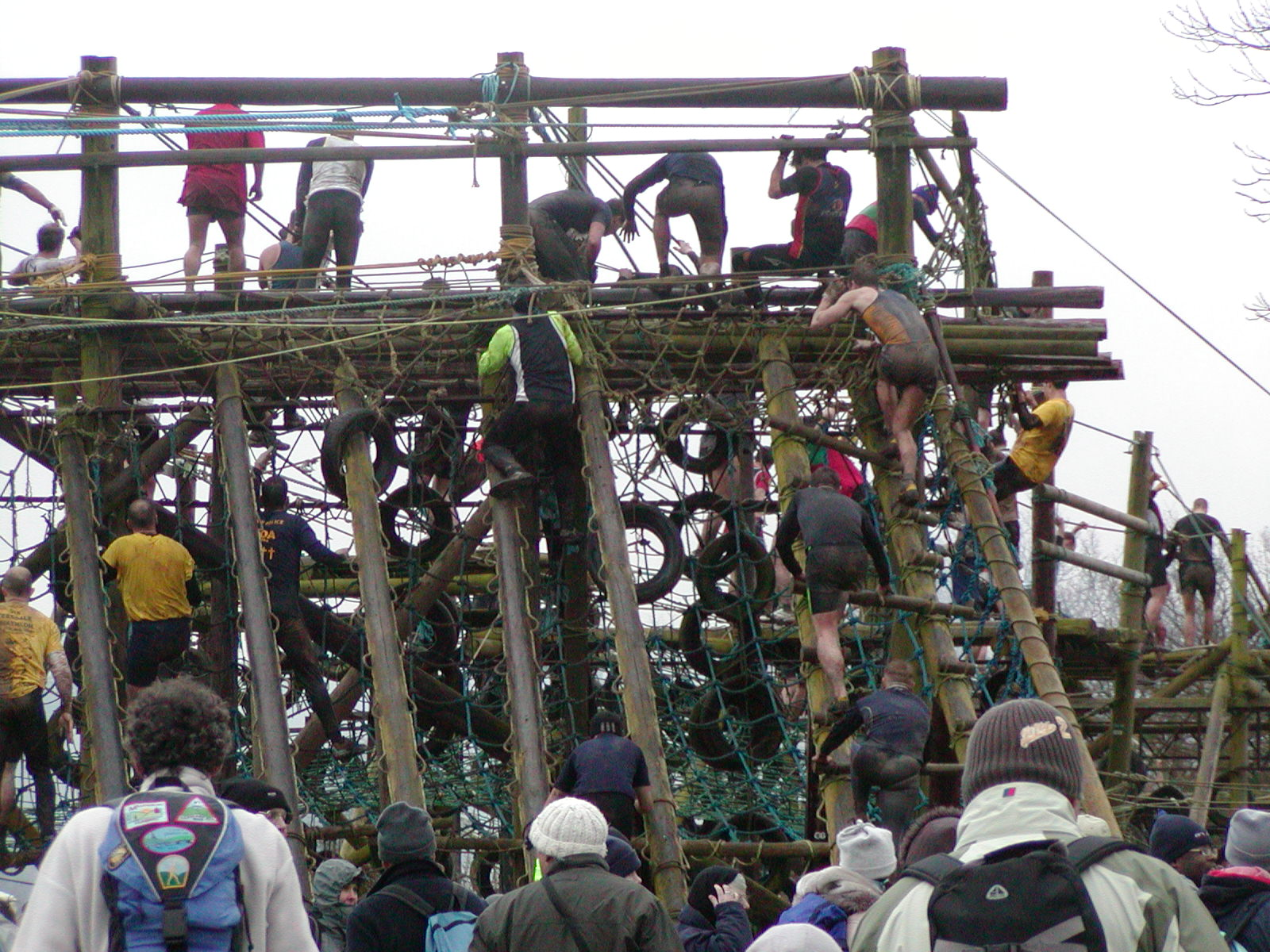 selbst A-punkt fotgrafiert Januar 2005